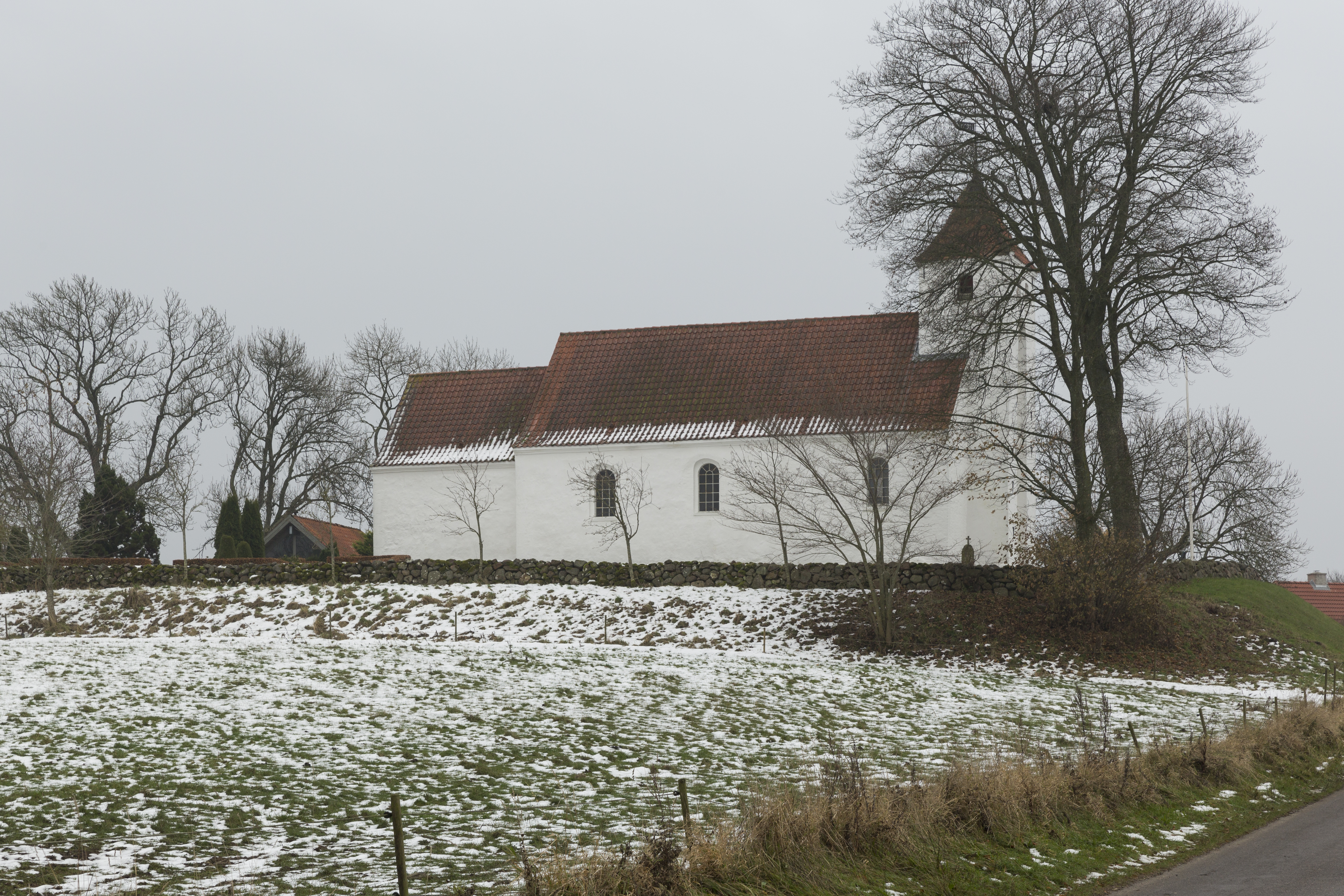 Tulstrup Kirke